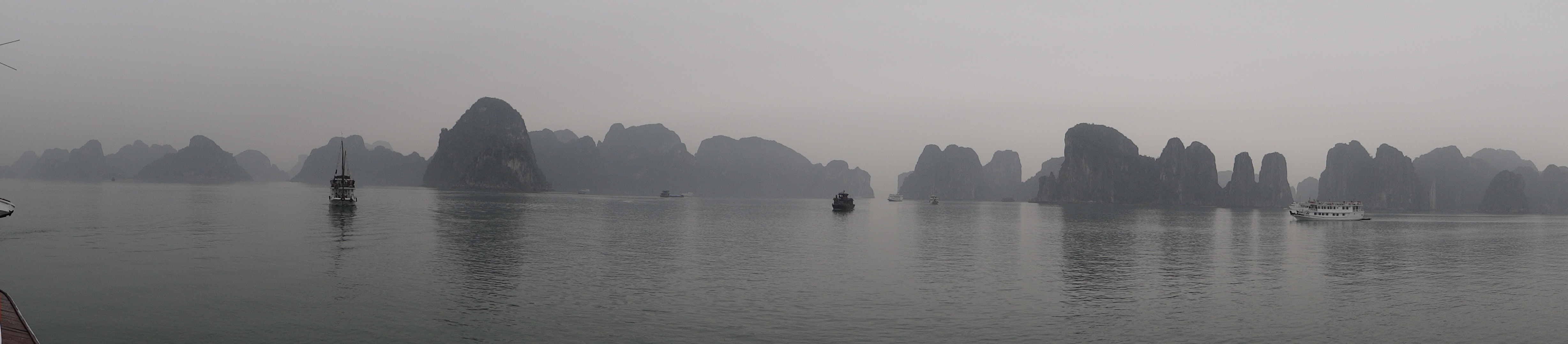 Vietnam - Baie d' Ha Long